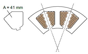 Darstellung der geometrischen Verhältnisse bei der Bestimmung des elektrischen Füllfaktors